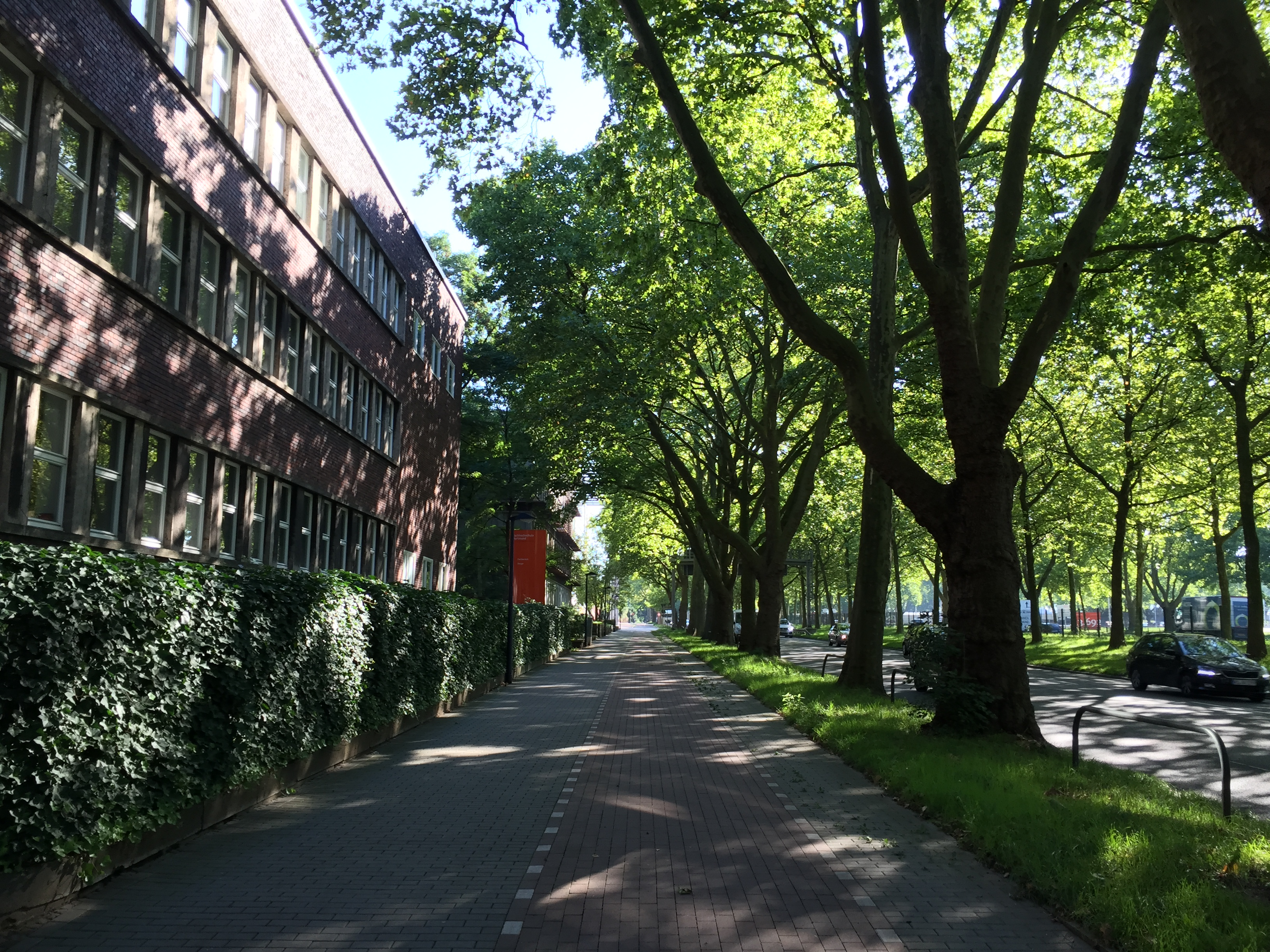 Allee Rheinlandamm Dortmund